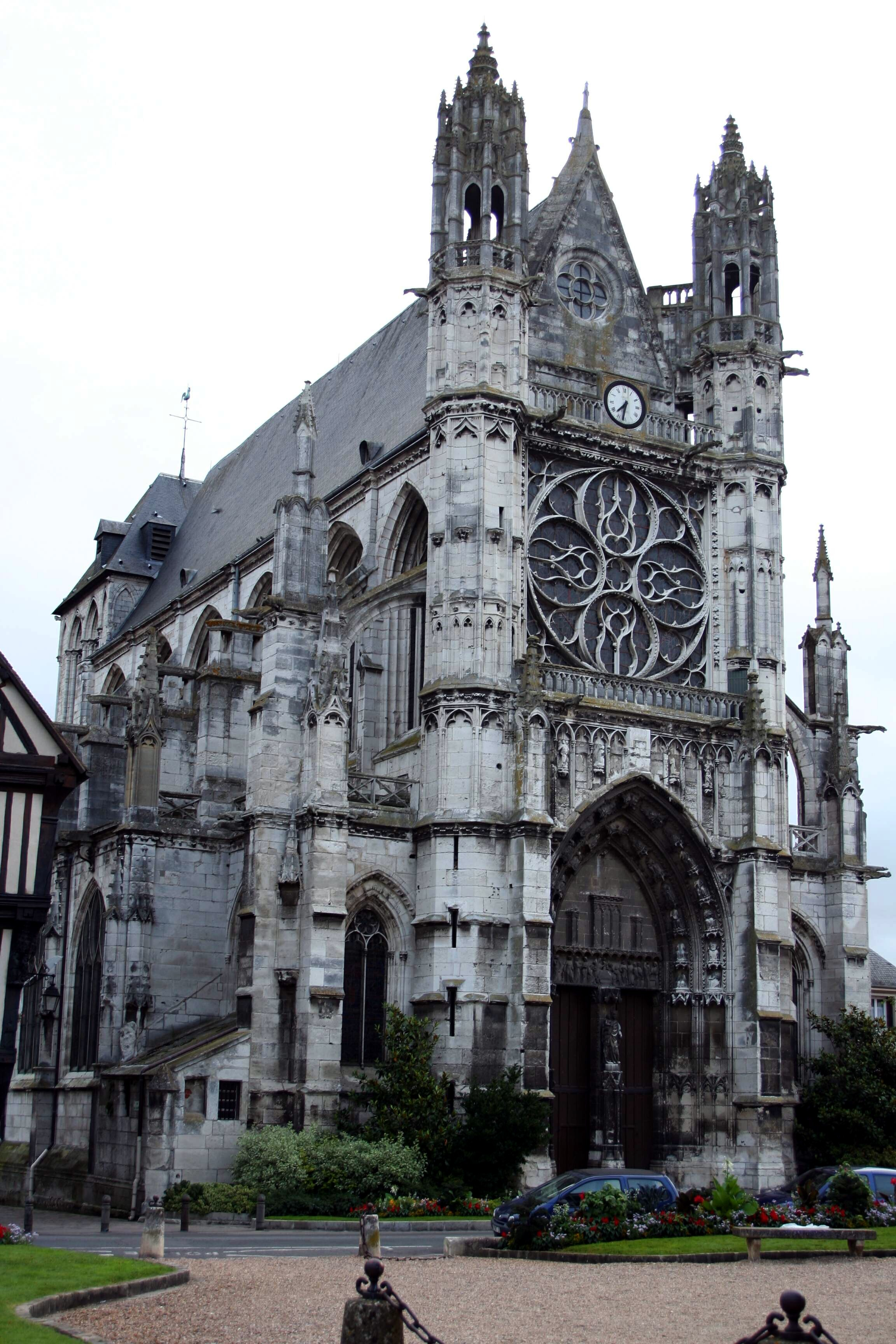 Église (collégiale Notre-Dame) à Vernon, Eure (France)